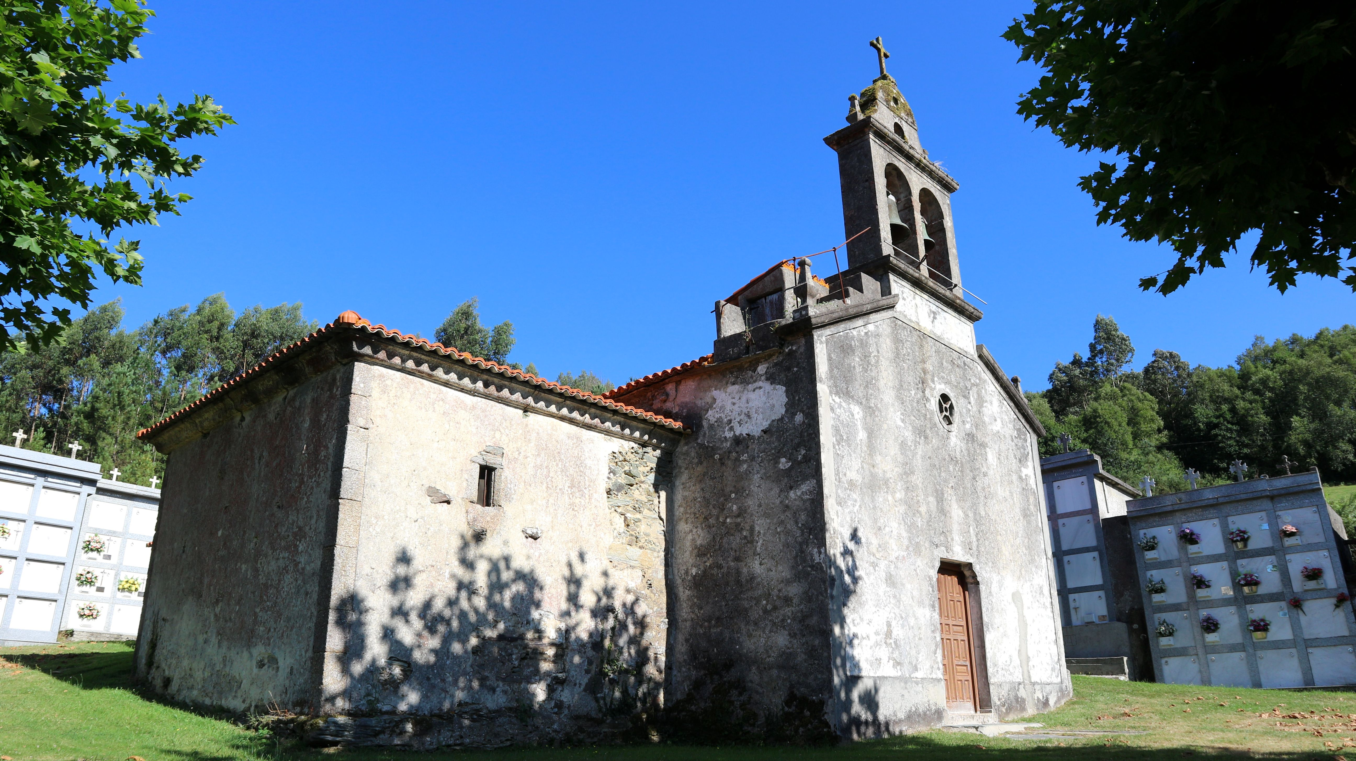 Igrexa de Santo Estevo de Loureda. Loureda, Oza-Cesuras.